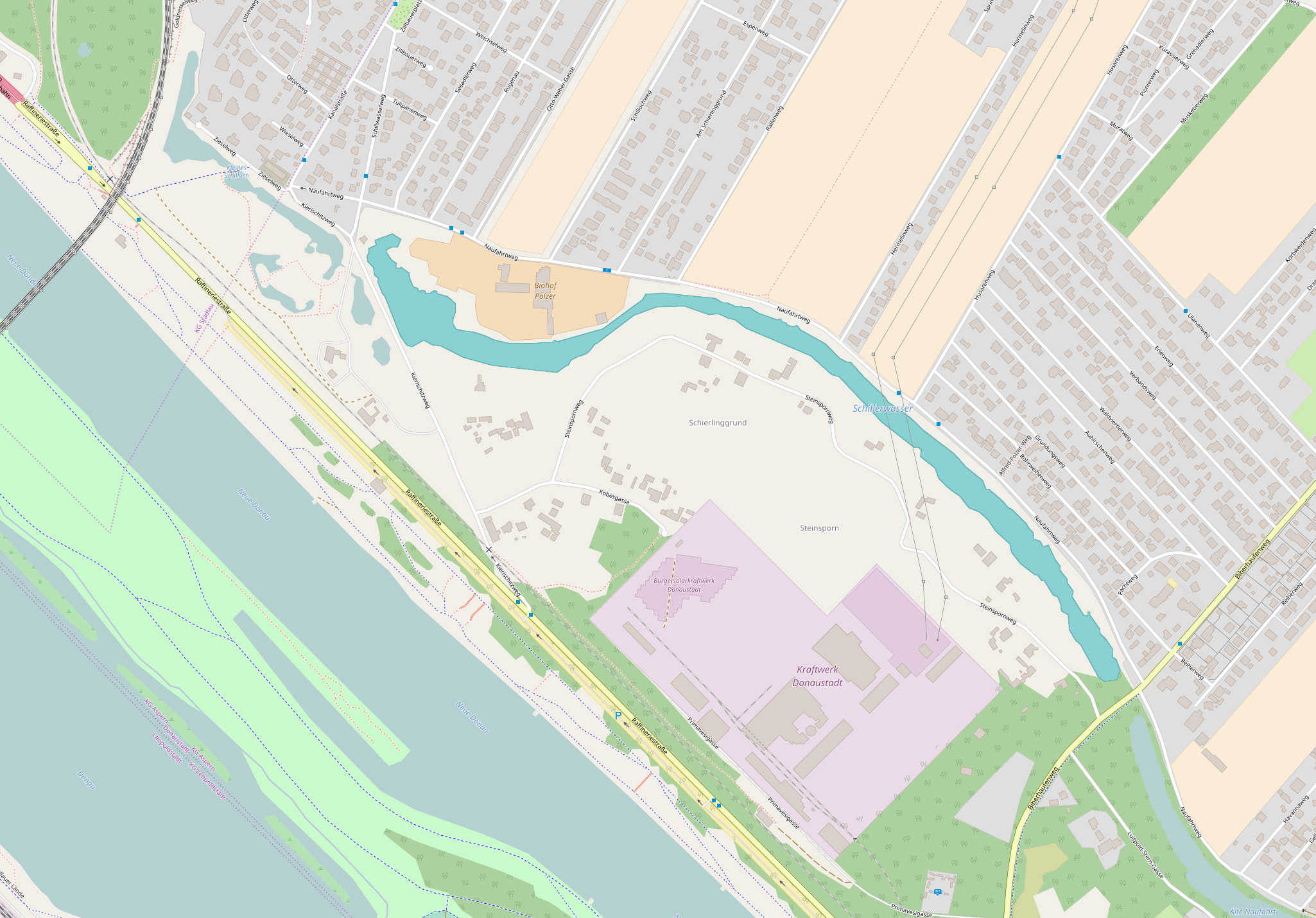 Schillerwasser in Wien-Donaustadt auf OpenStreetMap, 2017